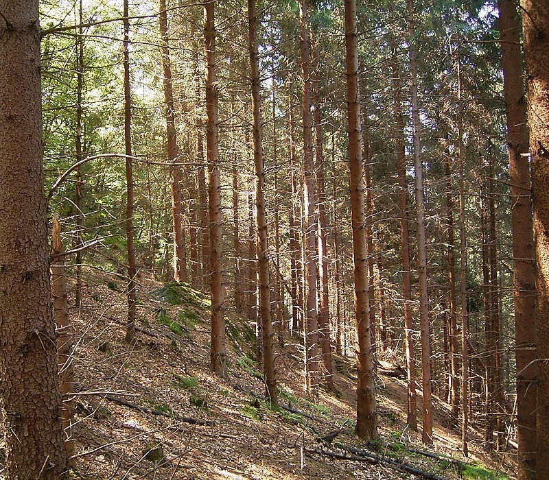 Picea abies